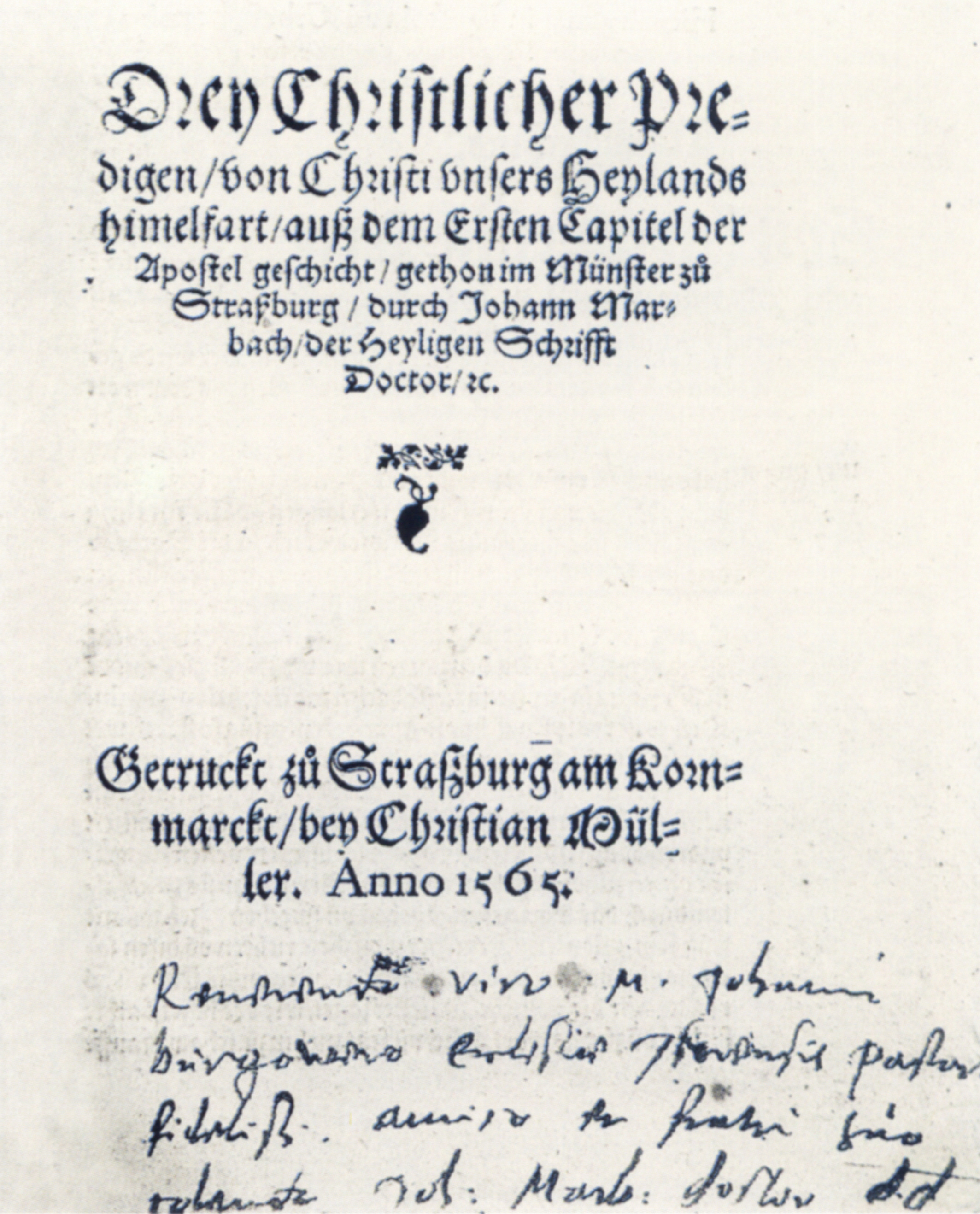 Johannes Marbach: Drey Christlicher Predigen, Straßburg, Christian Müller 1565 (Prädikantenbibliothek Isny)